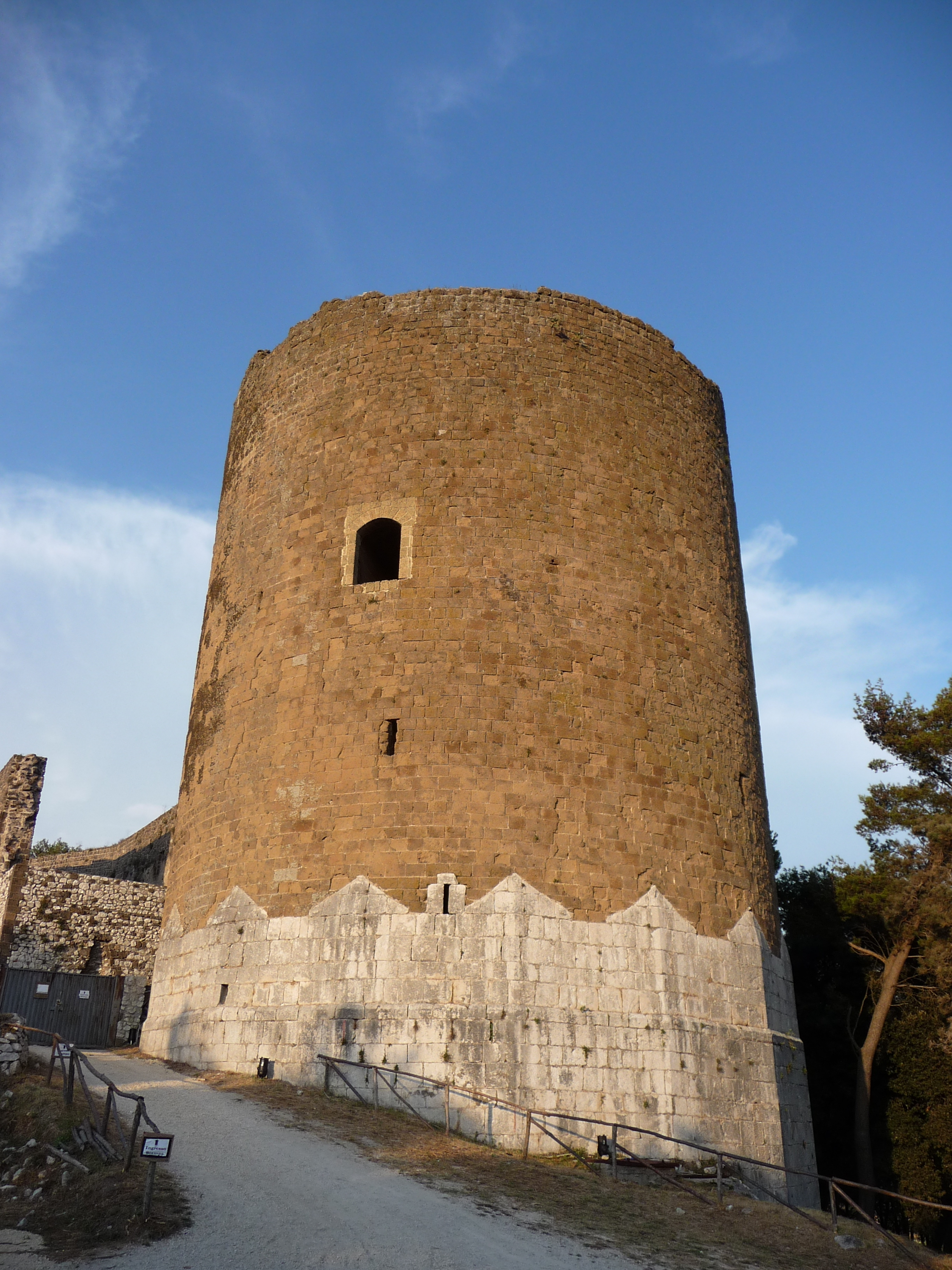 Casertavecchia